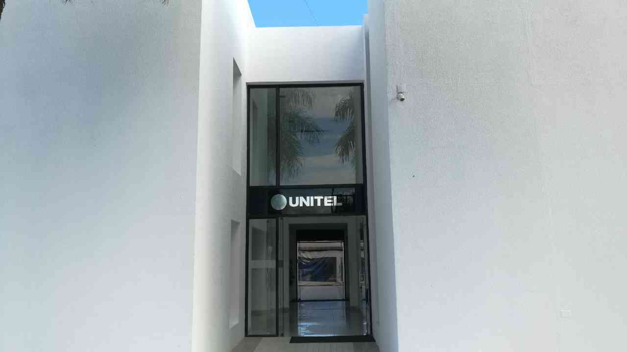 Entrada Principal de Unitel